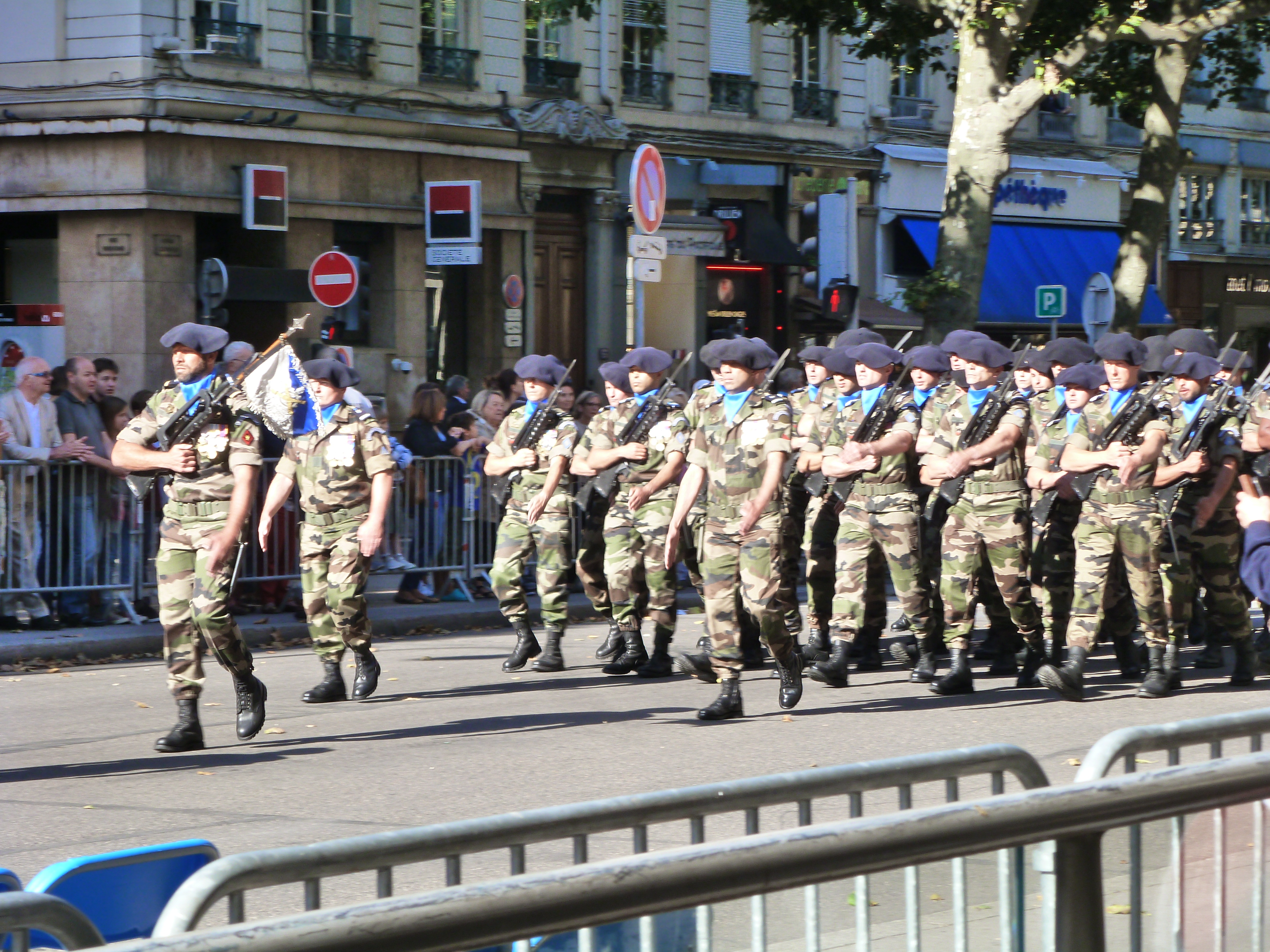 7ème bataillon de chasseurs alpins lors du défilé militaire du 13 juillet 2016 à Lyon.